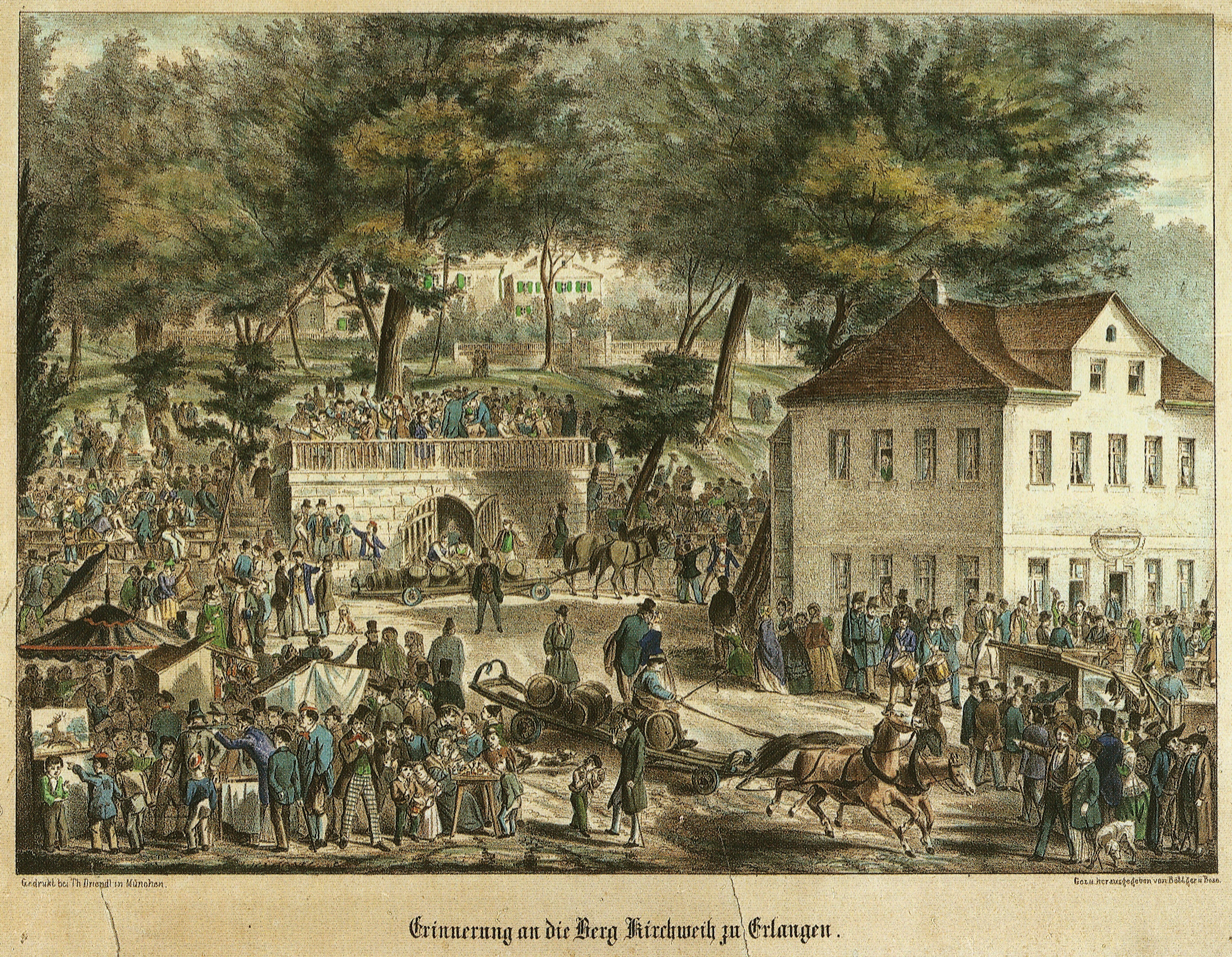 Ansicht der Bergkirchweih, 1853